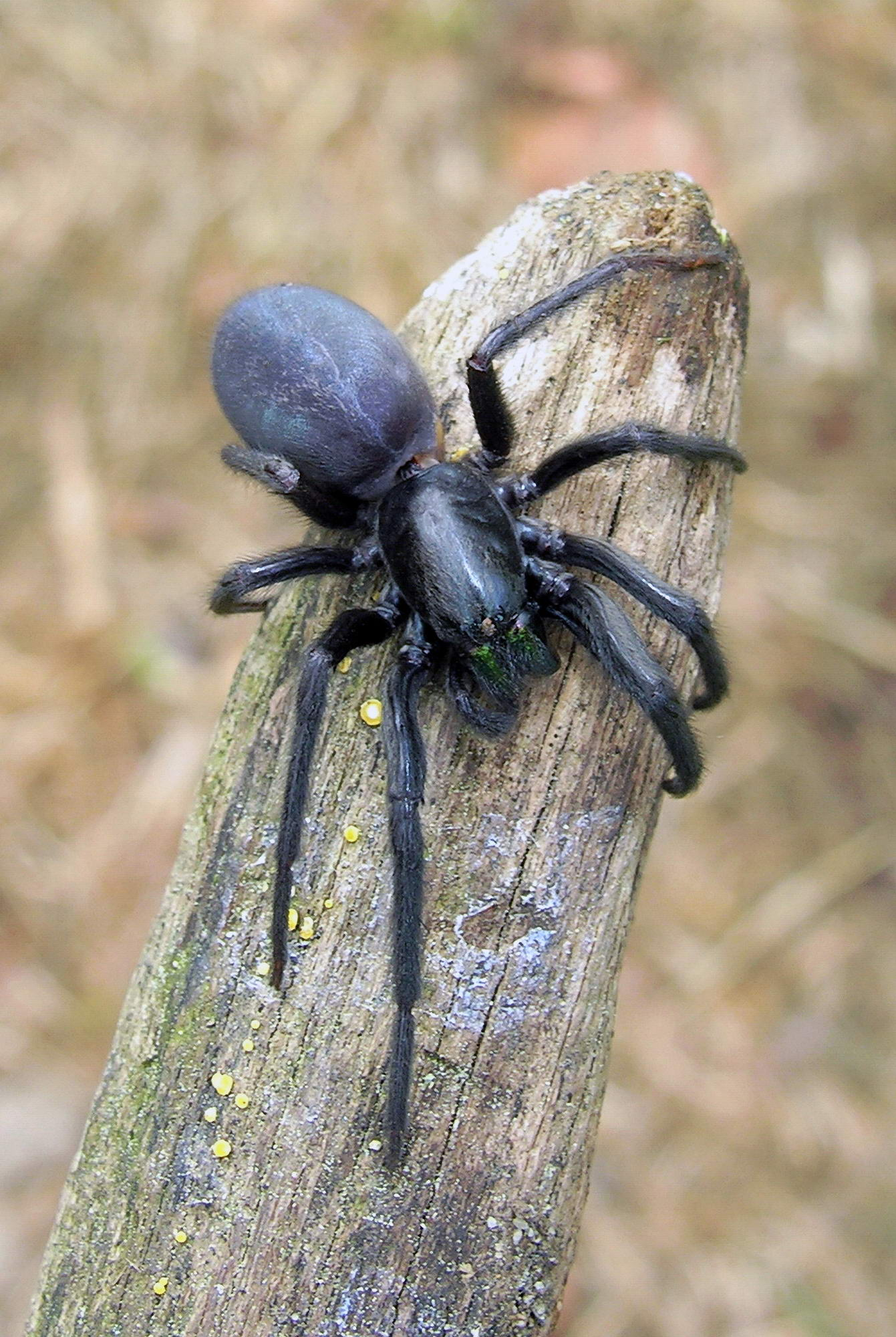 Foto dunha araña realizada en Mandaio, Oza dos Ríos, Galicia. O pau sobre o que está pousada pode ter uns 5 - 6 cm de diámetro